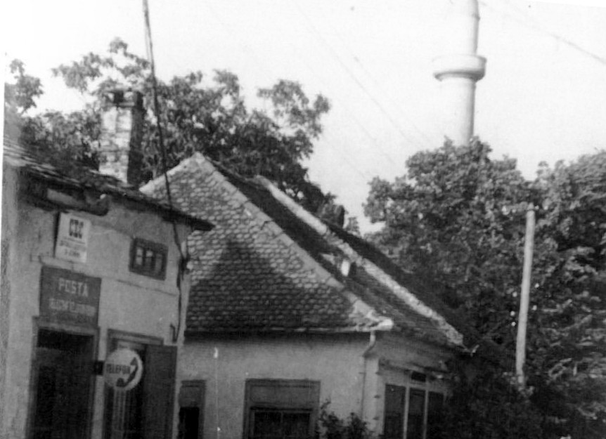 Ada Kaleh island